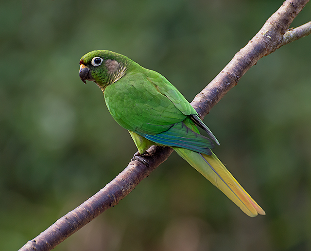 Trilha dos Tucanos - Tapirai-SP - Brasil